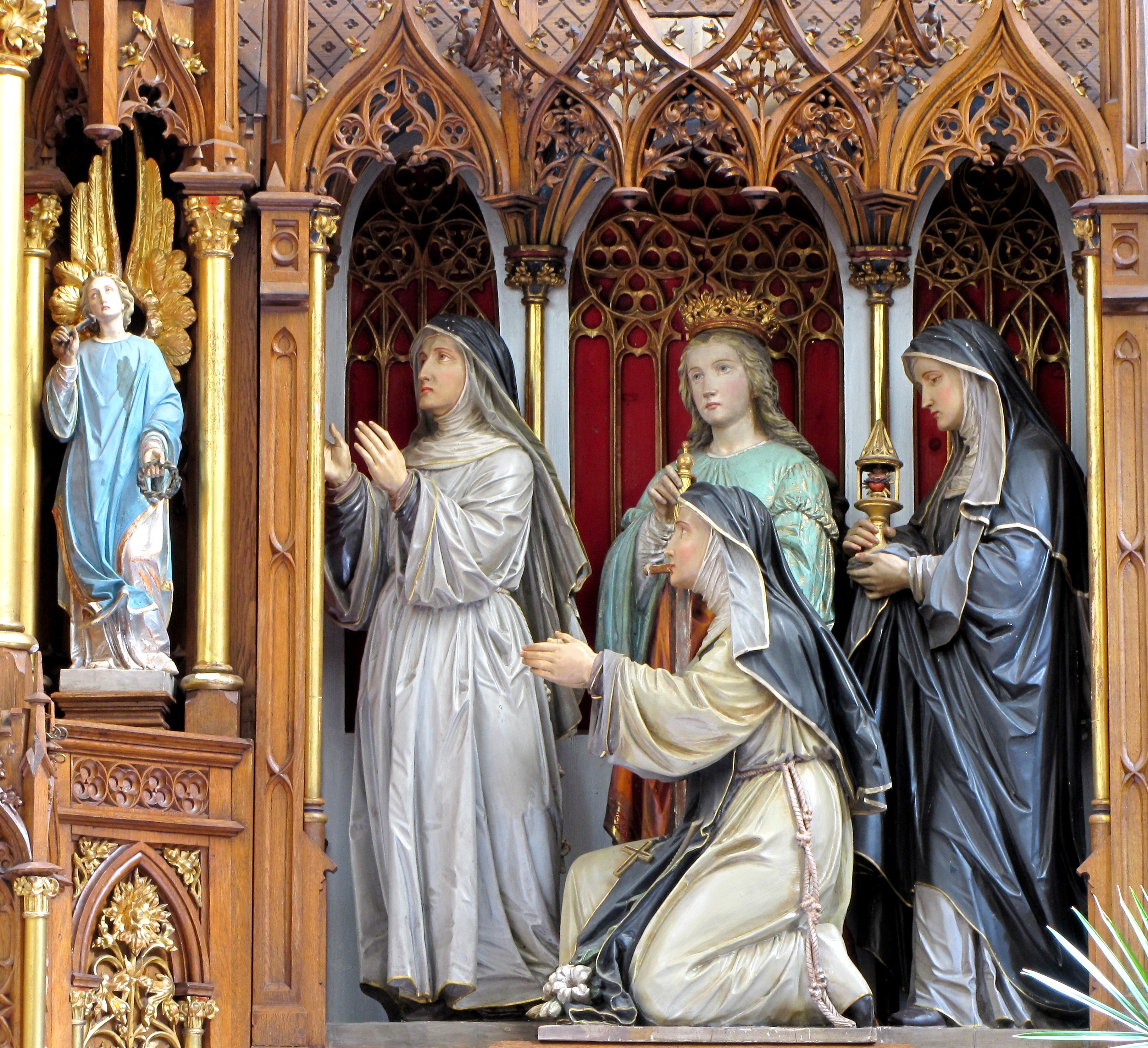 Alsace, Haut-Rhin, Ribeauvillé, Église du Couvent des Augustins (XIVe-XVe-XVIIIe), 3 rue de l'Abbé-Louis-Kremp. (PA00085586, IA68006914).Maître-autel (XIXe): Statues de l'aile droite: Sainte Julienne du Mont-Cornillon, sainte Catherine d'Alexandrie avec l'épée et la roue, sainte Marguerite-Marie Alacoque portant un reliquaire contenant le coeur ardent couronné d'épines, sainte Gertrude avec une fleur de lys.